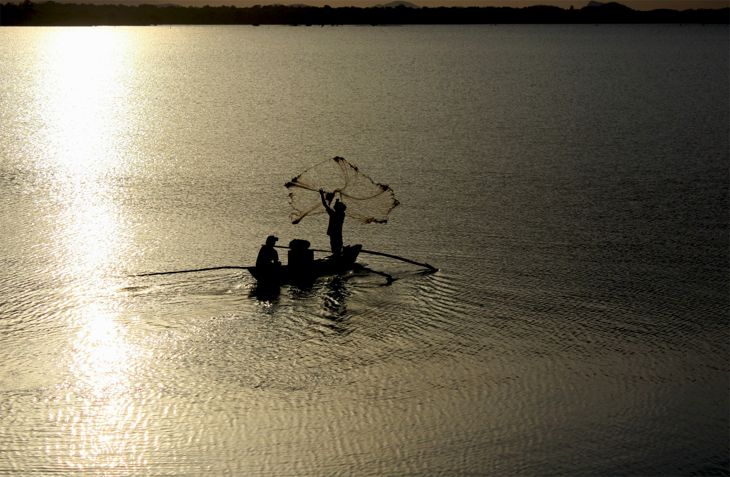 உன்னிச்சைக் குளம் - மீன்பிடி